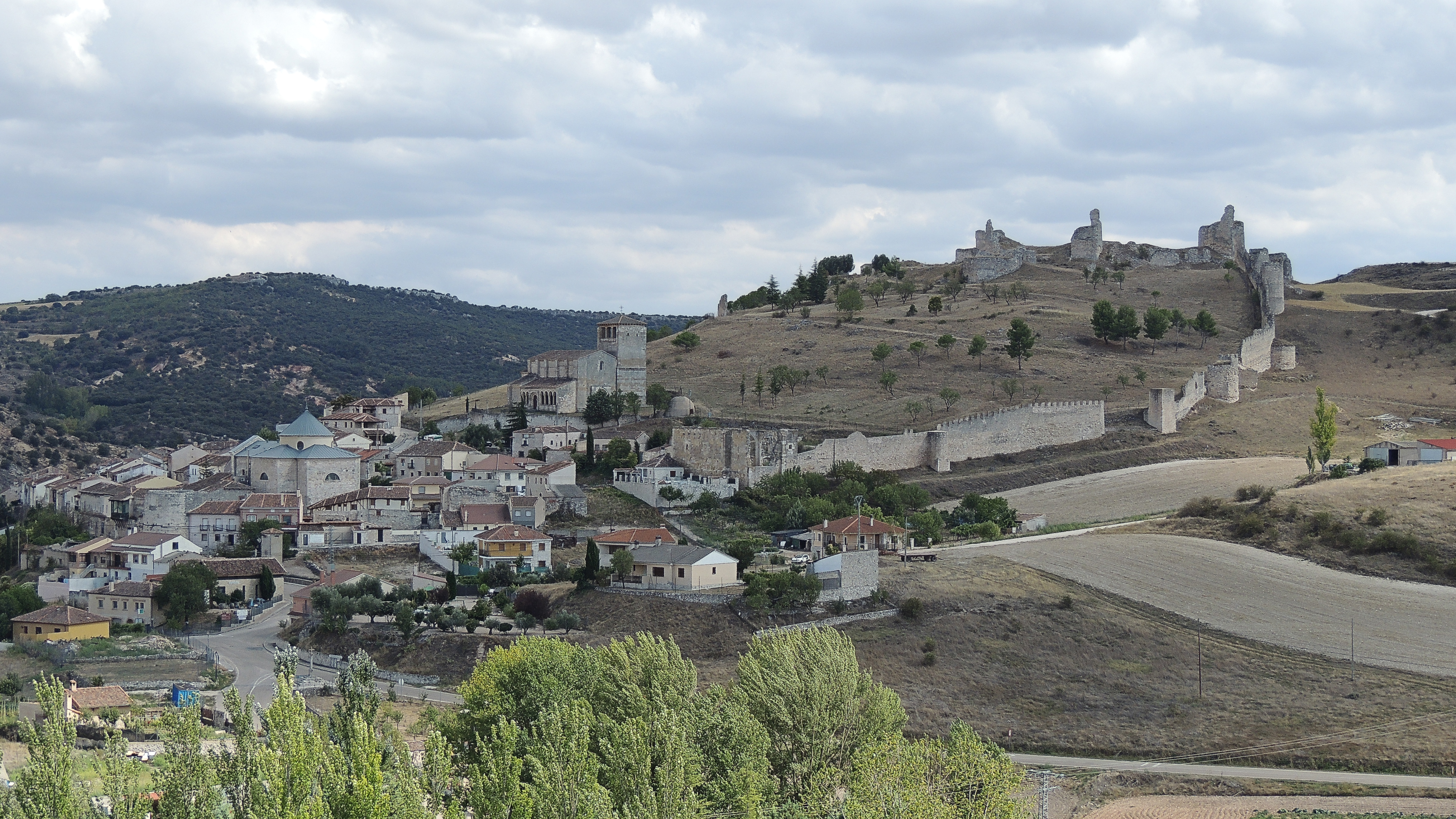 Vista de la localidad de Fuentidueña (provincia de Segovia).